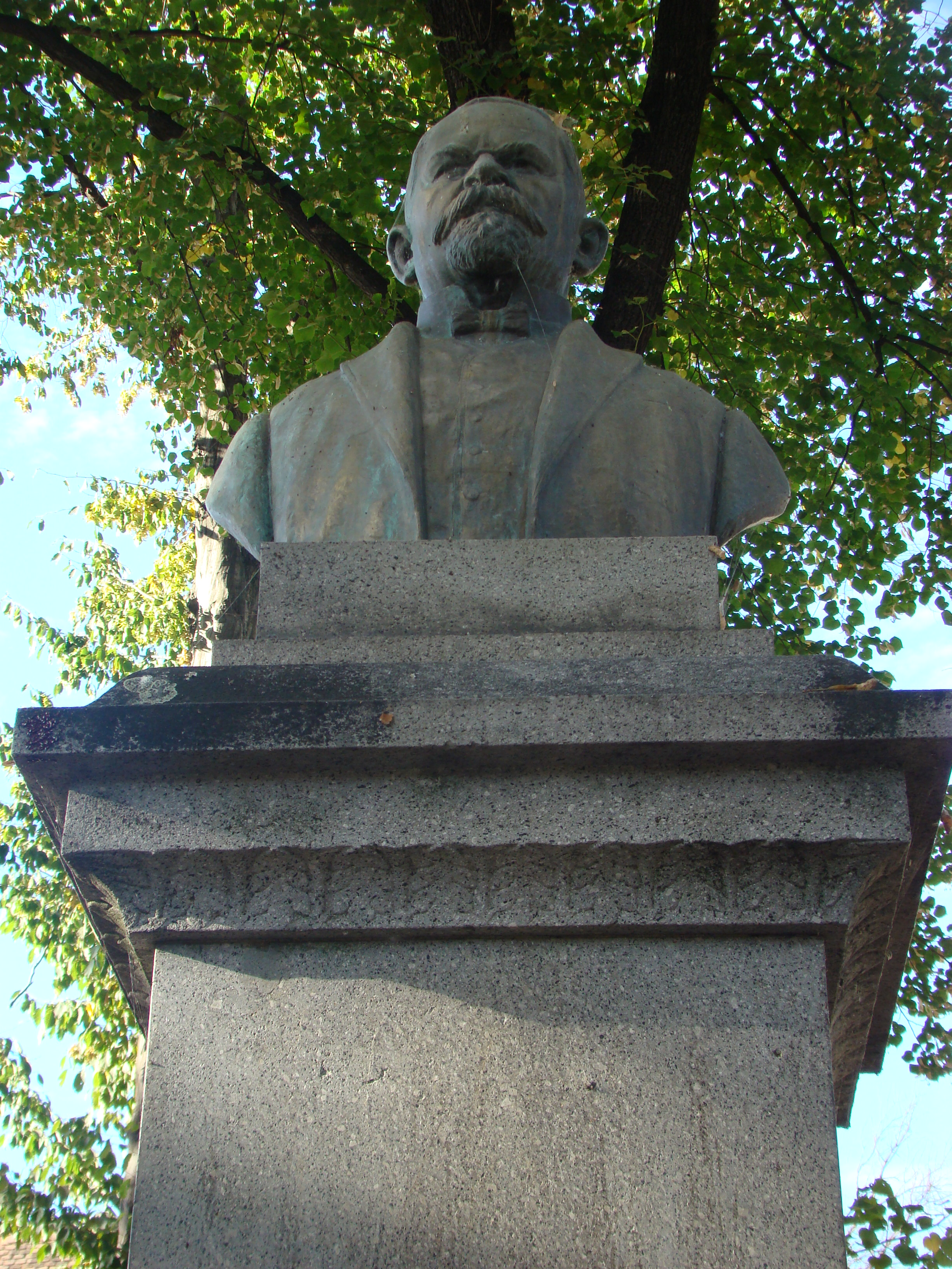 Bustul lui Nicolae Henţiu